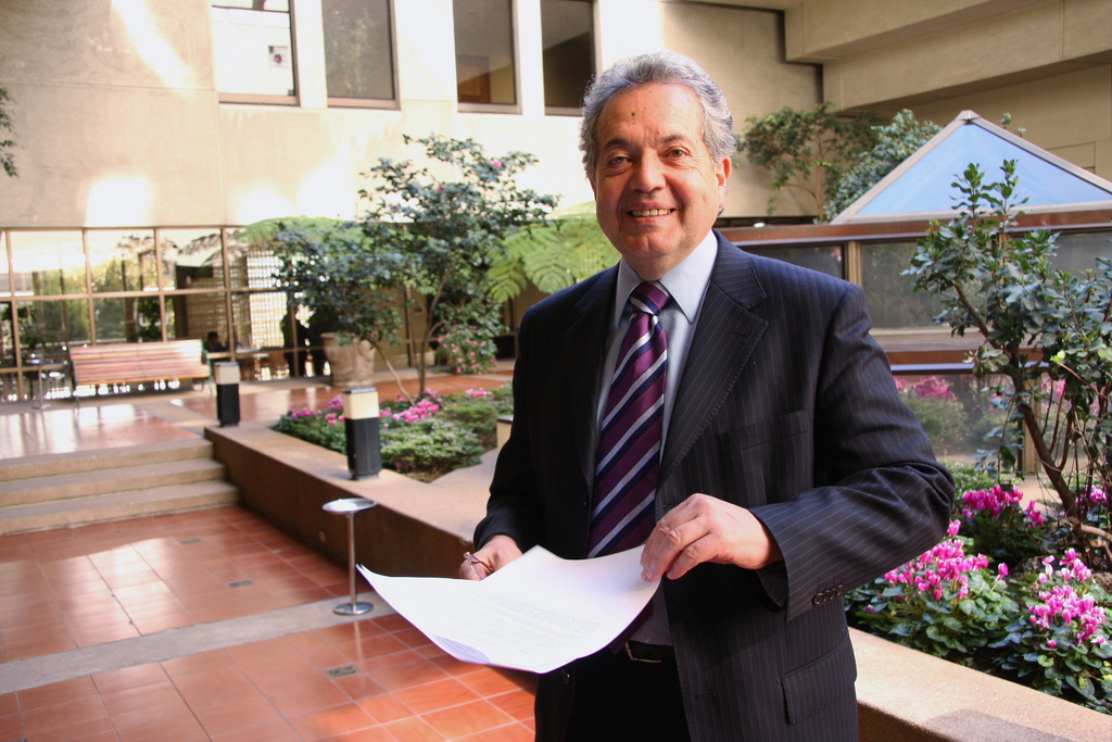 Diputado Guillermo Ceroni Fuentes en exteriores del Congreso Nacional, de pie con documento en las manos, sonriendo.